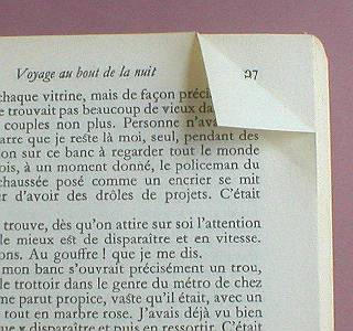 Corne de marquage sur Voyage au bout de la nuit de Céline, éditions Folio